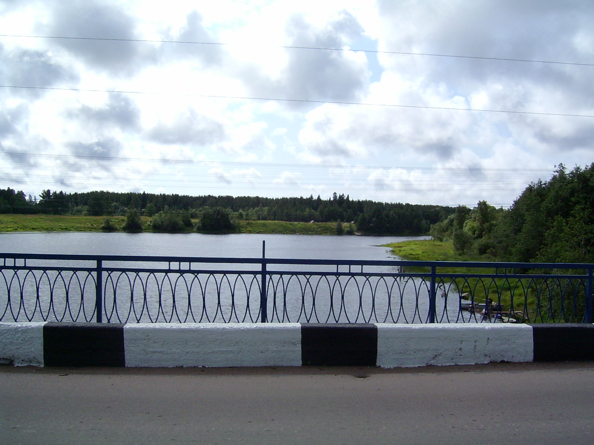 Bridge in Salmi (Tulemajoki river)